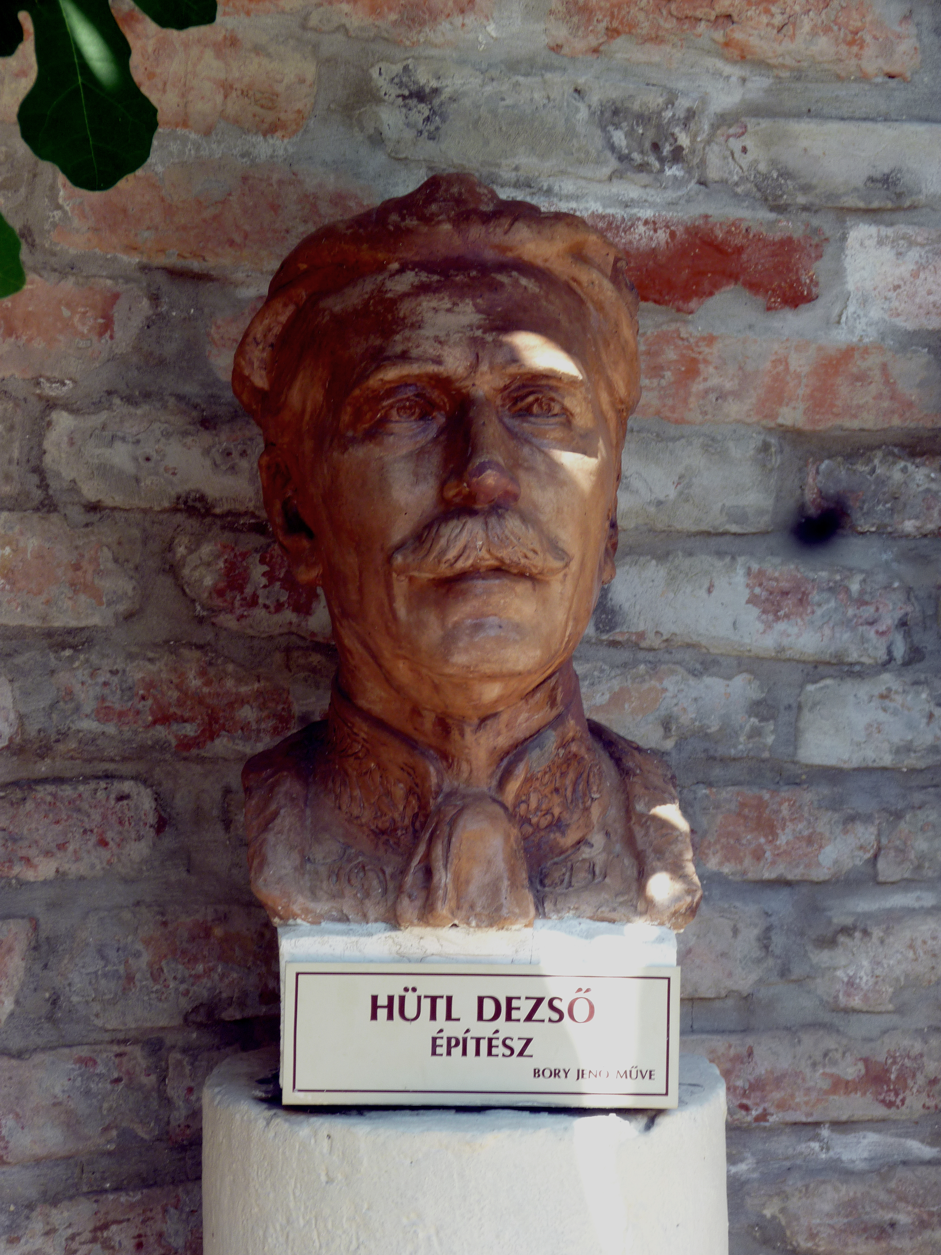 Bory Jenő: Hültl Dezső mellszobra (Bory-vár, Székesfehérvár)